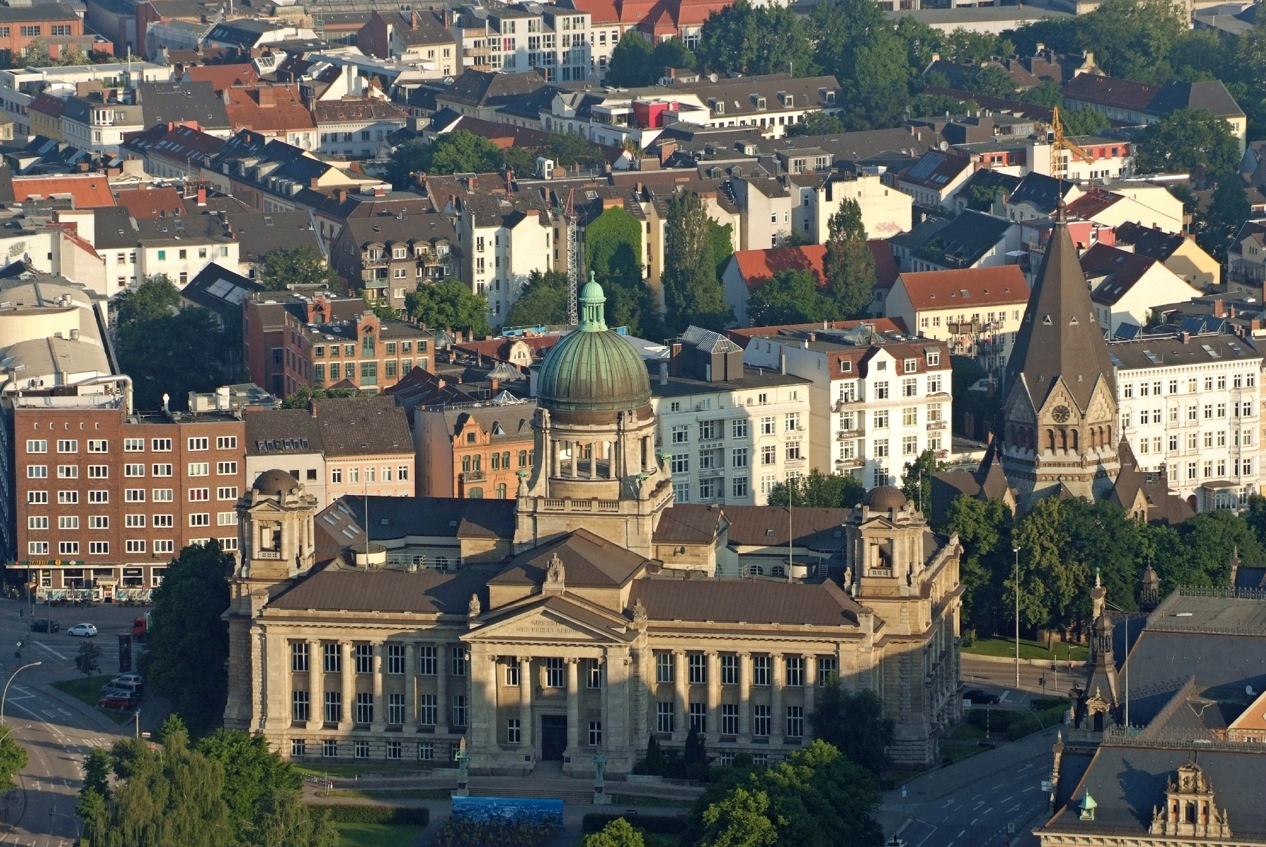 Hanseatisches Oberlandesgericht (Hamburg), Architekten: Lundt & Kallmorgen, (1907 - 1912) Gnadenkirche St. Pauli; jetzt Hl.Johannes von Kronstadt This is a photograph of an architectural monument.